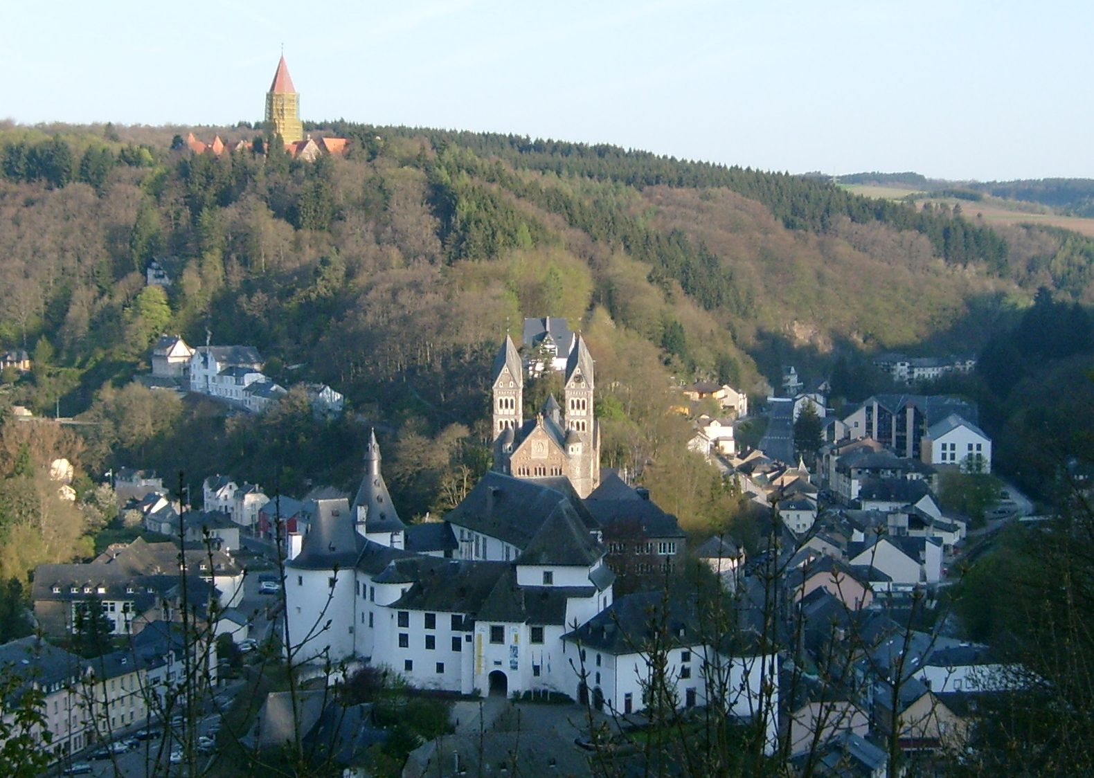 Sujet: D'Schlass Klierf, 2. Mee 2008 Auteur: User:PlayMistyForMe Source: eege Foto